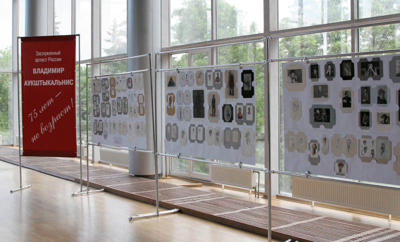 Саратов. Саратовский академический театр драмы. Фойе театра